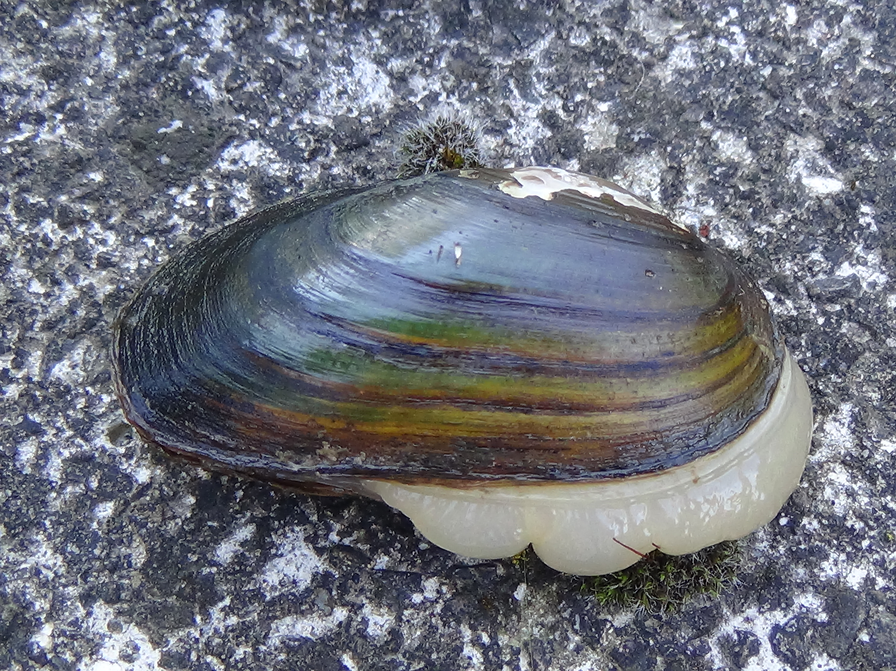 Jedno z náhodne odlovených korýtok riečnych pri bežnom monitoringu Detvianskeho potoka v Detve.